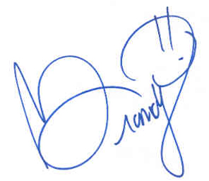 Signatur av artisten Brandy